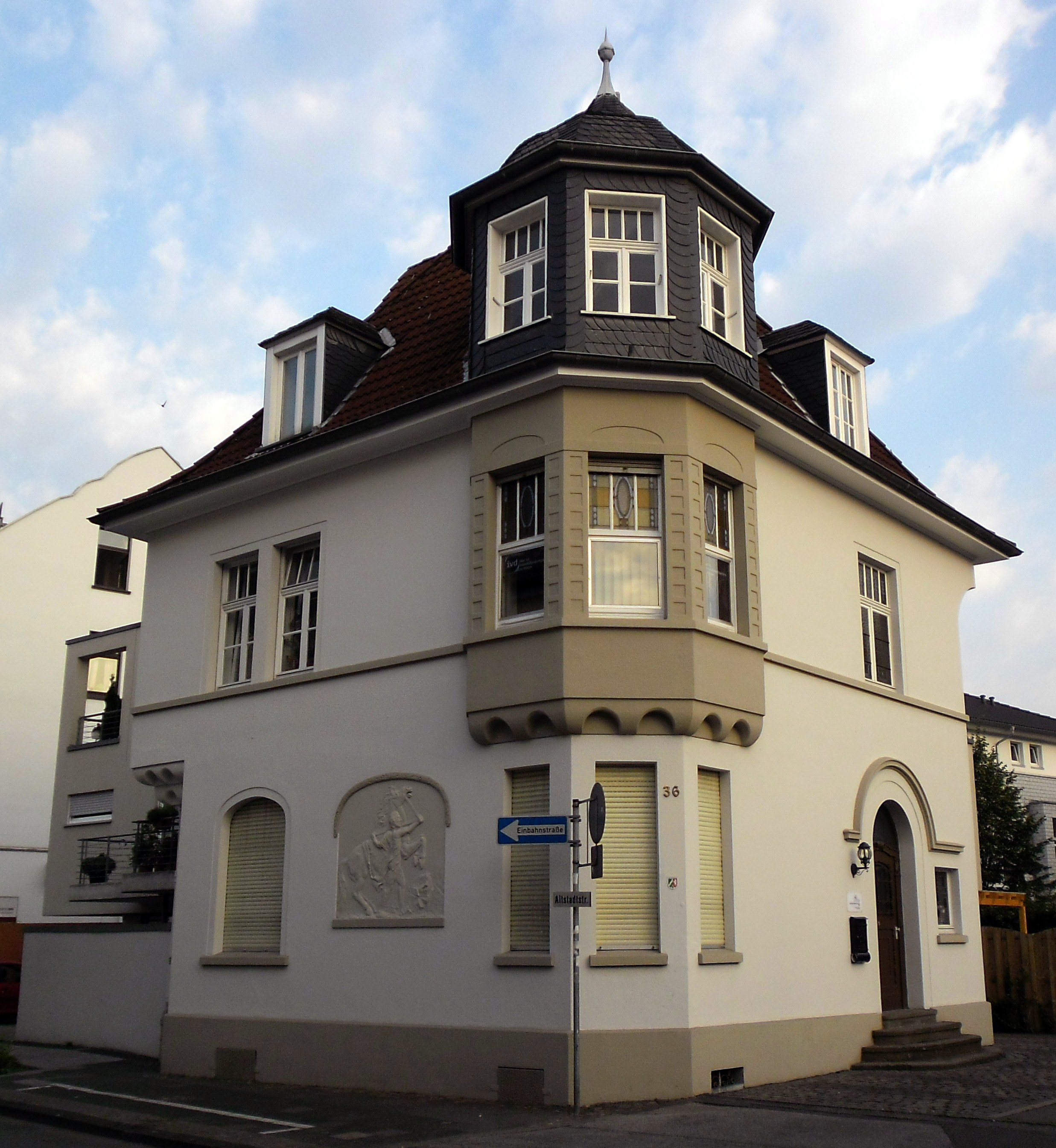 Baudenkmal: Leverkusen-Opladen, Villa Mühlstroh Altstadtstrasse 36.